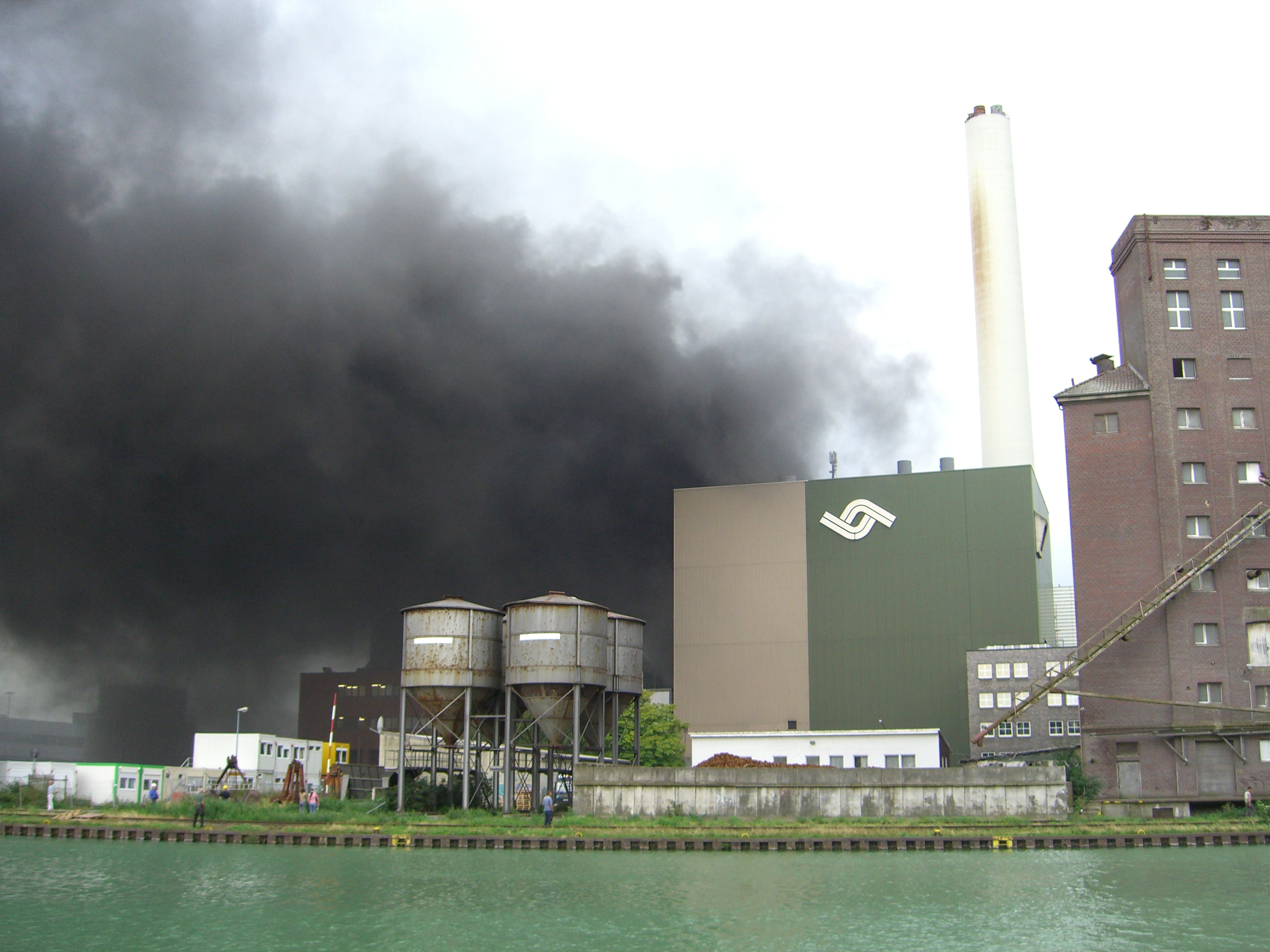 Brand der Stadtwerke Münster